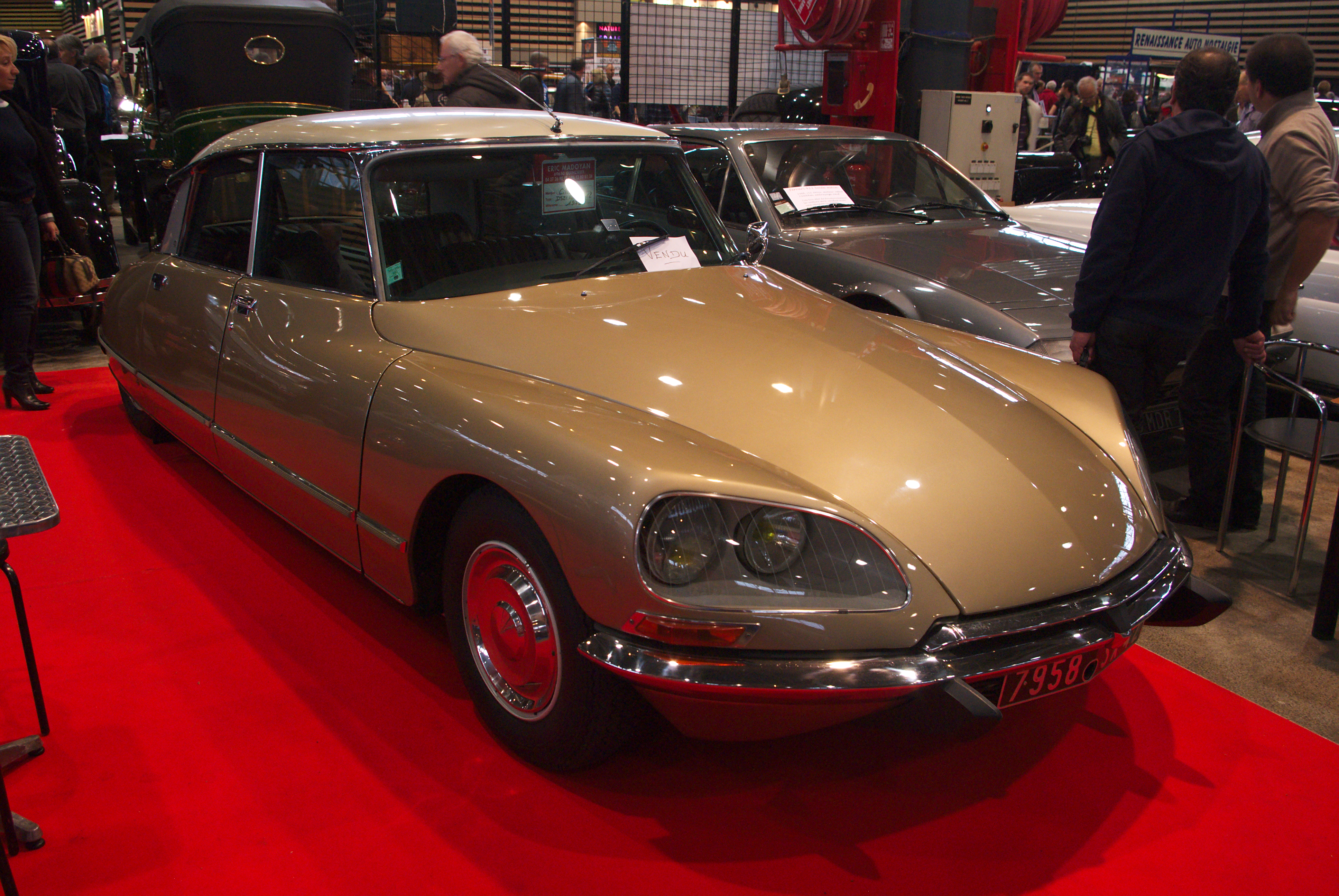 DS à Epoqu'auto 2012